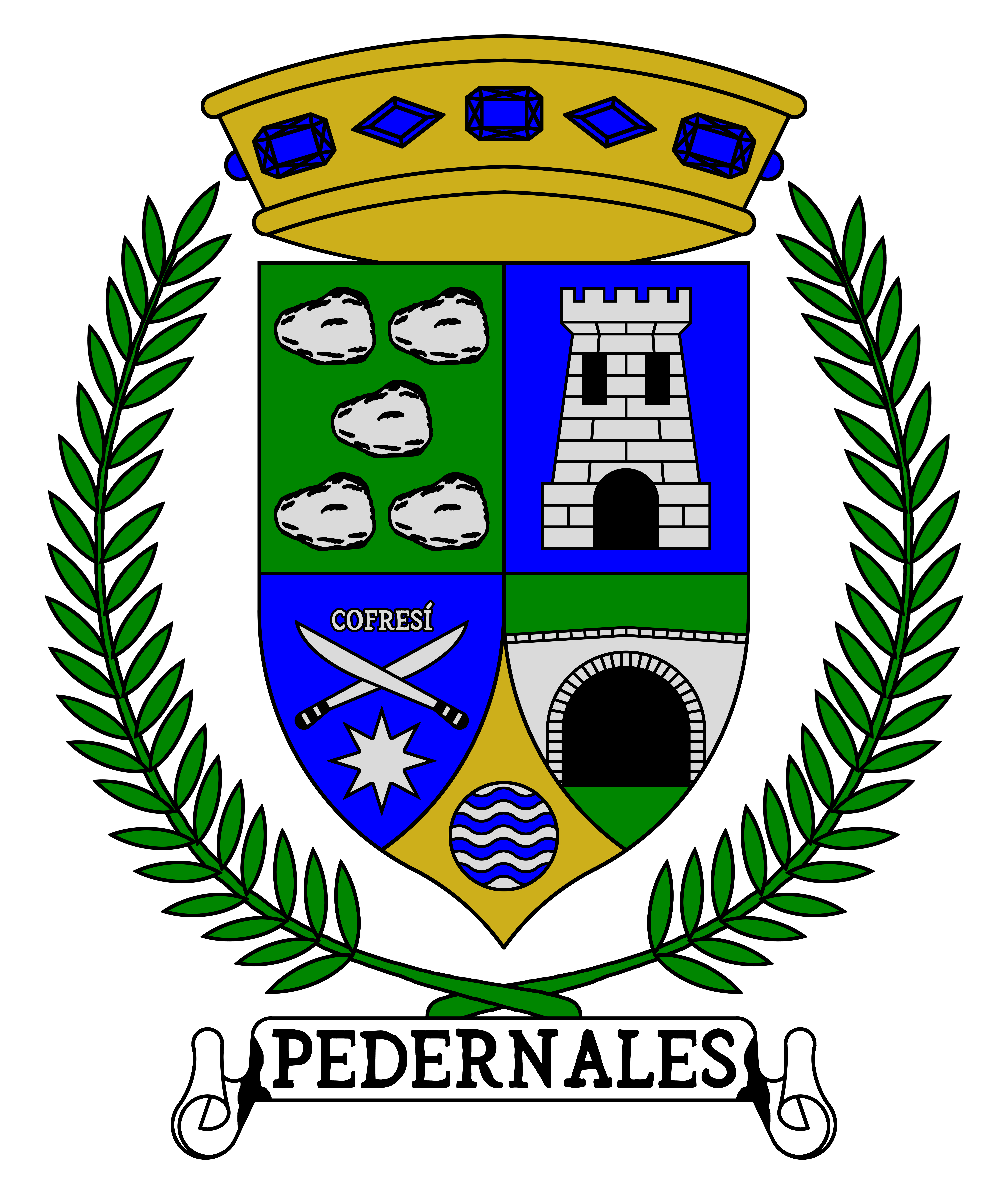 Escudo del Barrio Pedernales